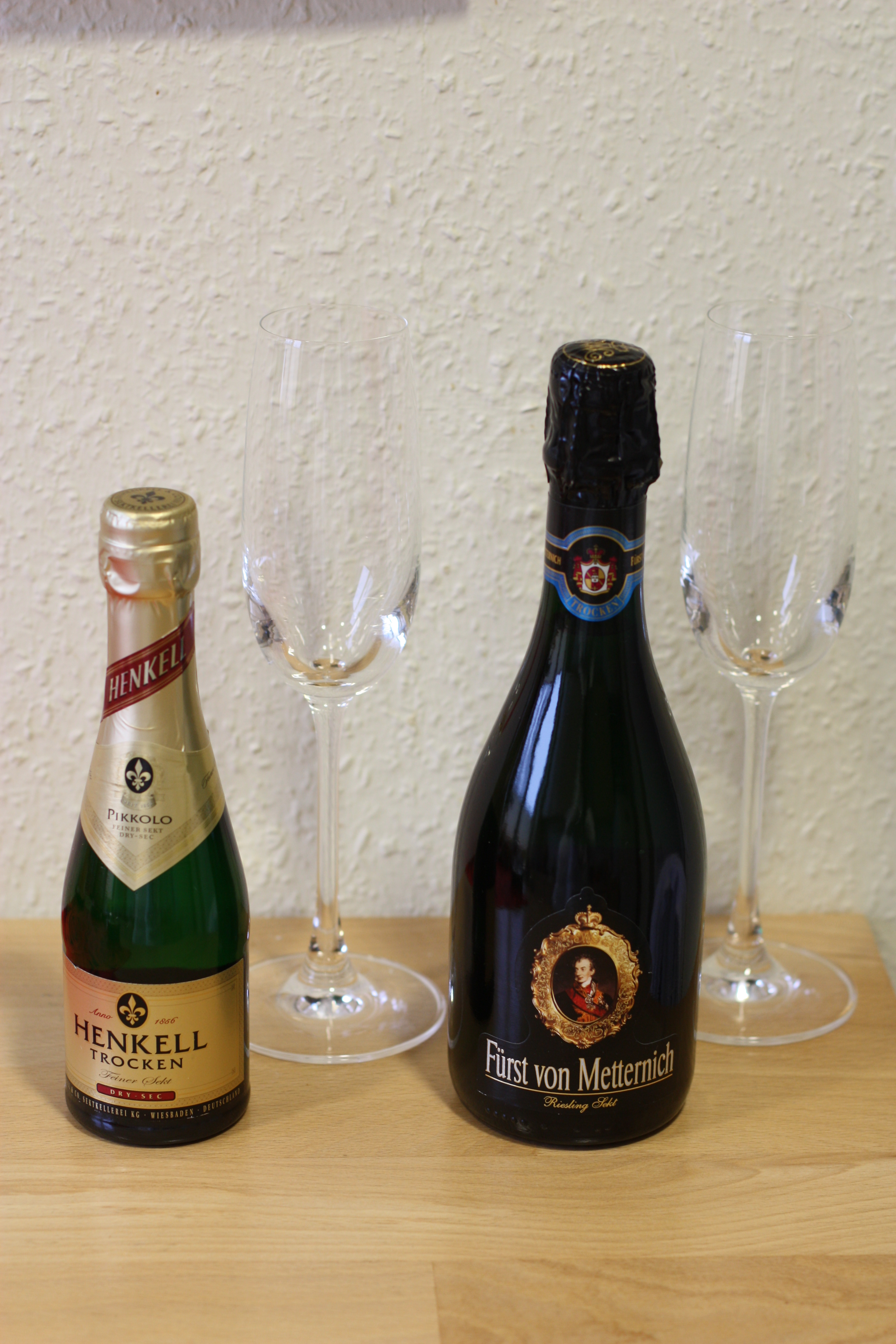 Sekt